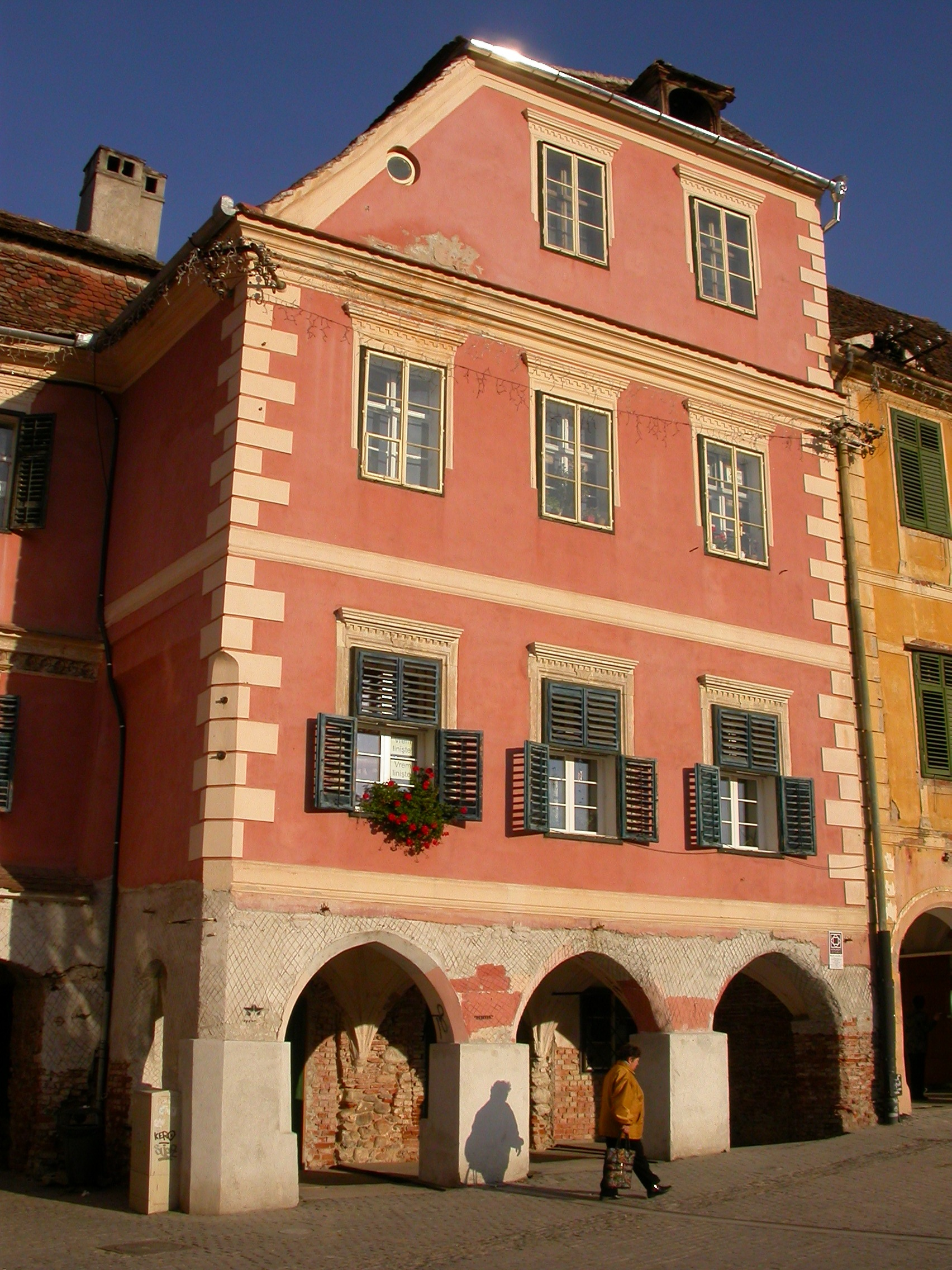 Casă (înglobează turn de apărare - incinta II), sec. XV - XVI, sec. XVIII; înc. sec. XX